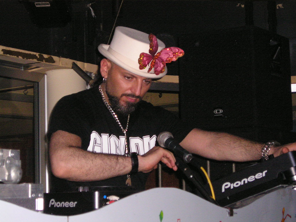 Gigi D'Agostino beim Auflegen